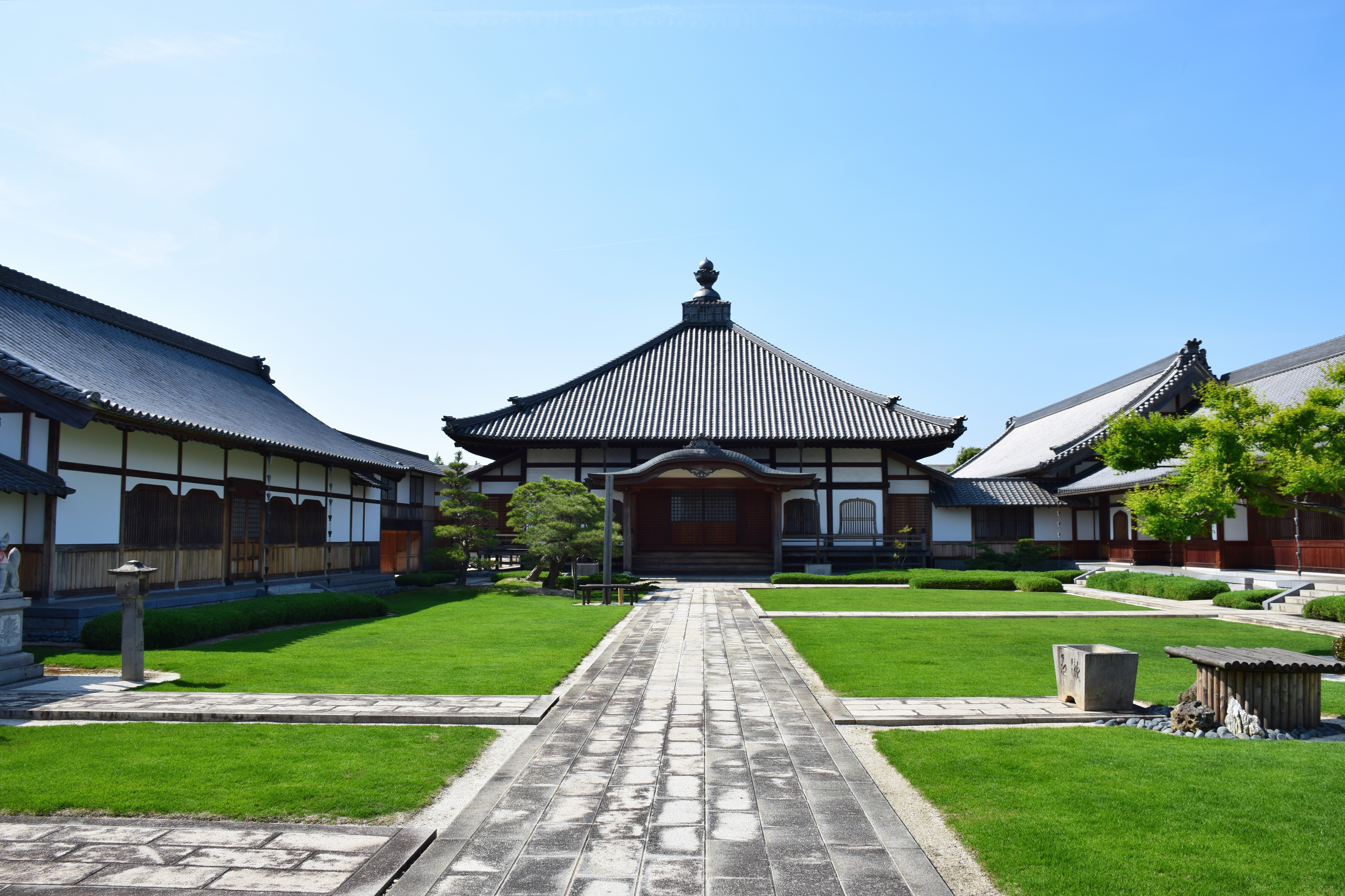 愛知県刈谷市の楞厳寺（りょうごんじ）の本堂と境内